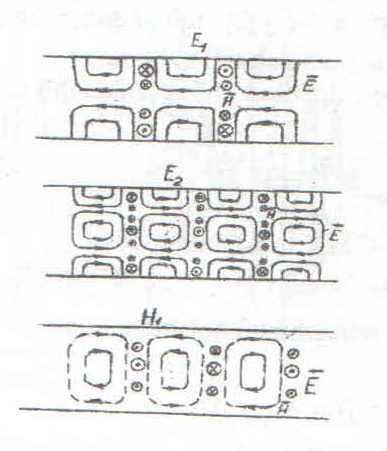 Ալիքի տիպեր երկհարթային ալիքատարում